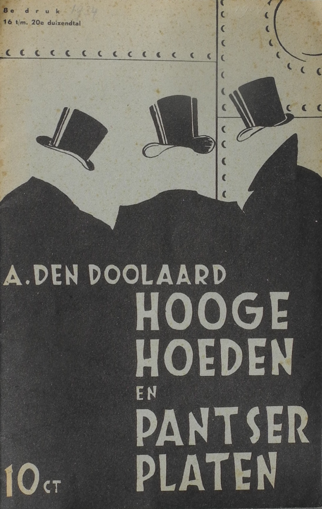 Hooge hoeden en pantserplaten, manifest A. den Doolaard, boekomslag door Fré Cohen.